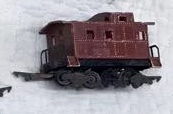 Vagão HO Breque (Caboose) da MIRIM